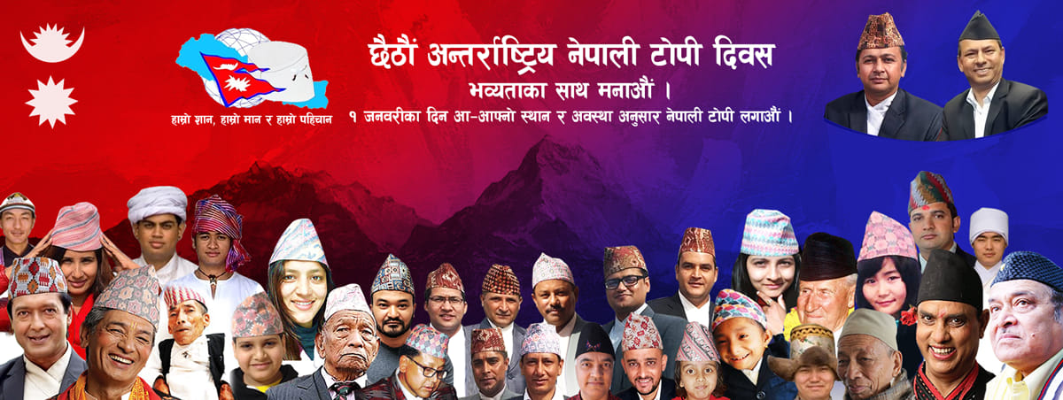 नेपाली: छैठौ अन्तर्राष्ट्रिय टोपी दिवस